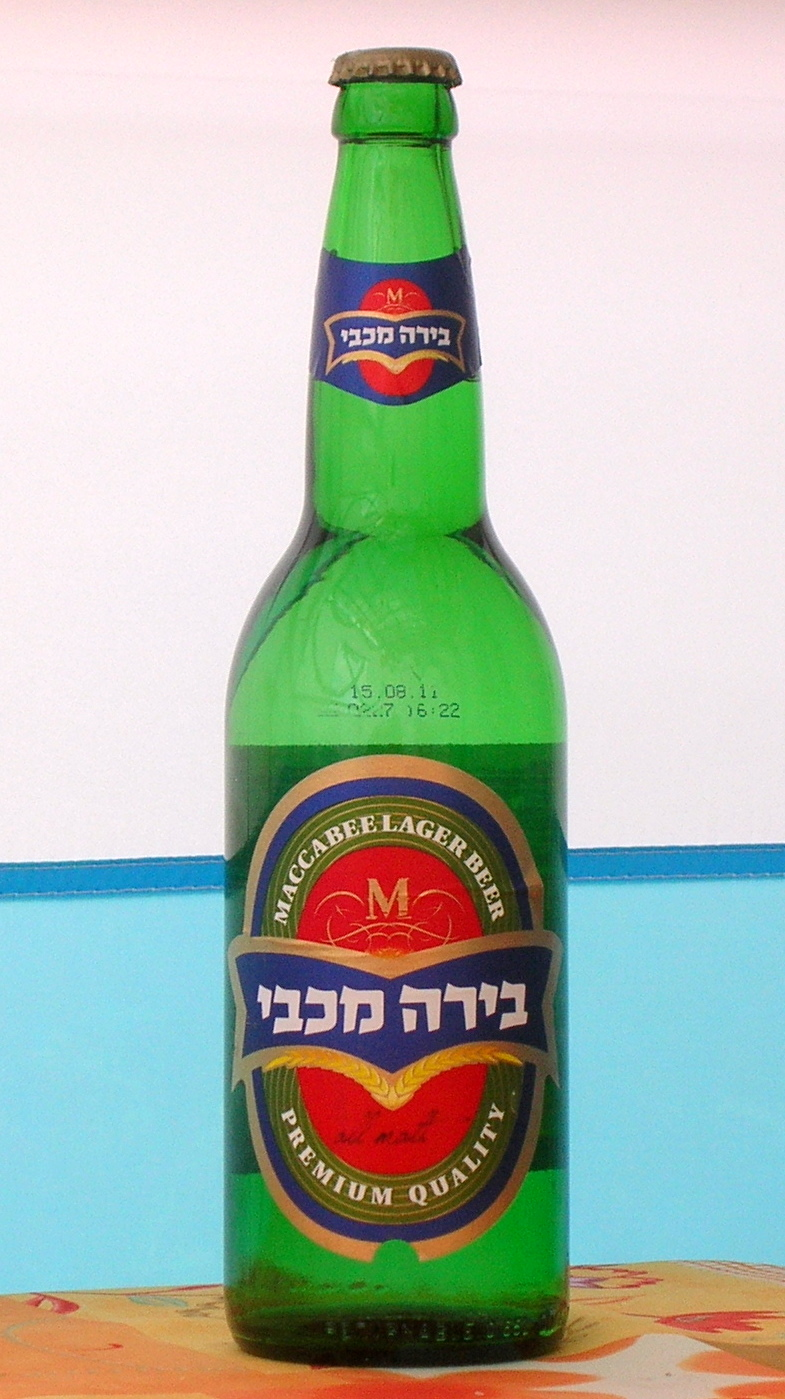 בקבוק בירה מכבי